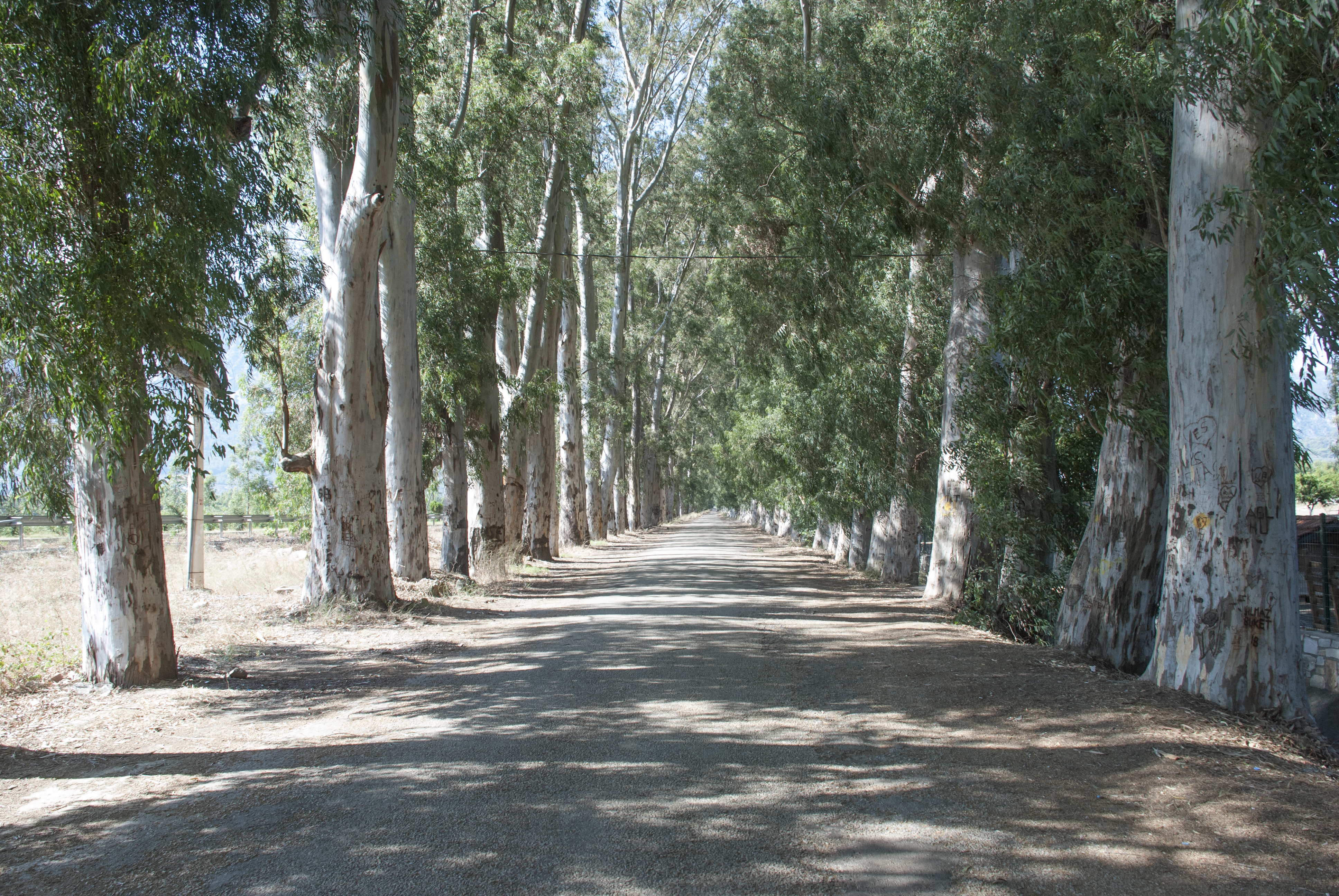 Gökova'yı Marmaris'e bağlayan Okaliptüs Yolu